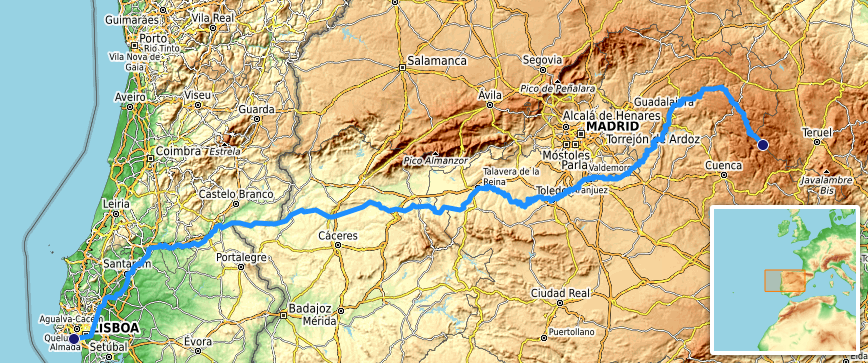 carte réalisée sur umap.openstreetmap This map may be incomplete, and may contain errors. Don't rely solely on it for navigation.